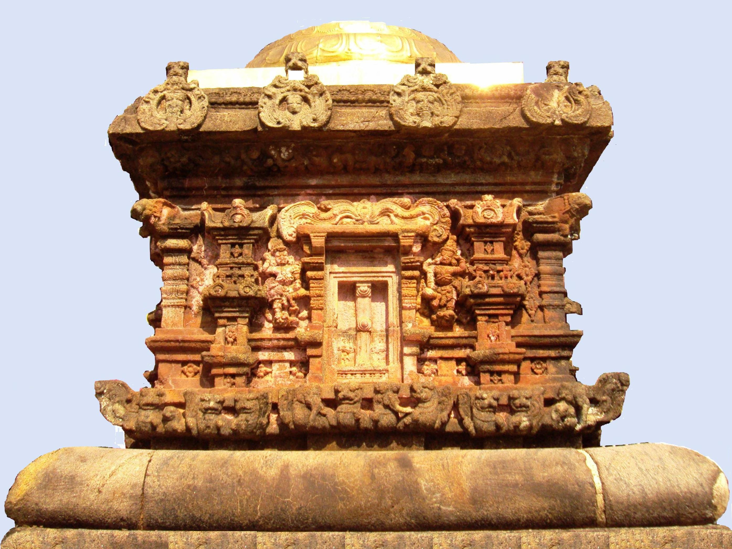 വലിയബലിക്കല്ല്